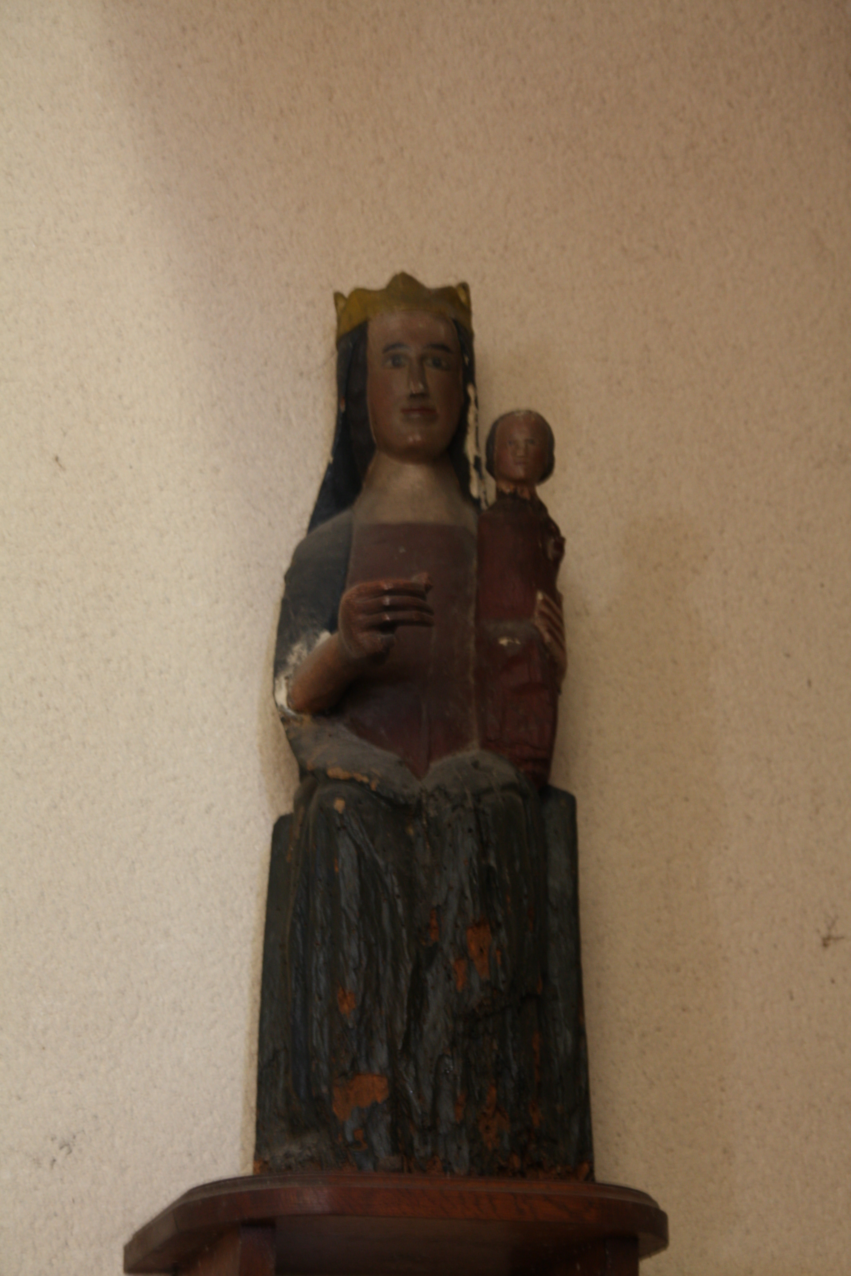 Église Notre-Dame d'Hérisson, (Allier) France